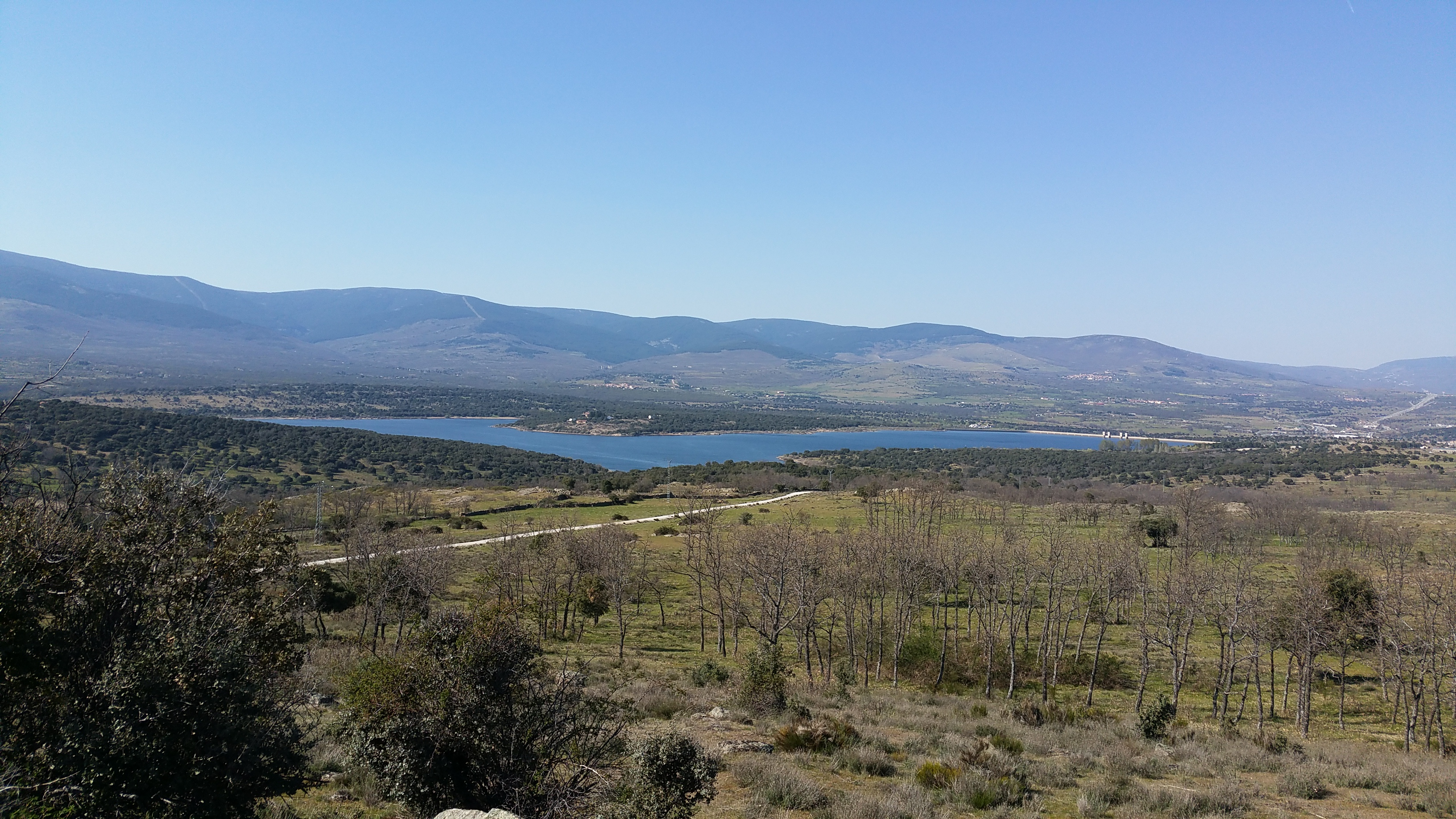 Embalse de Riosequillo, junto a Buitrago de Lozoya.